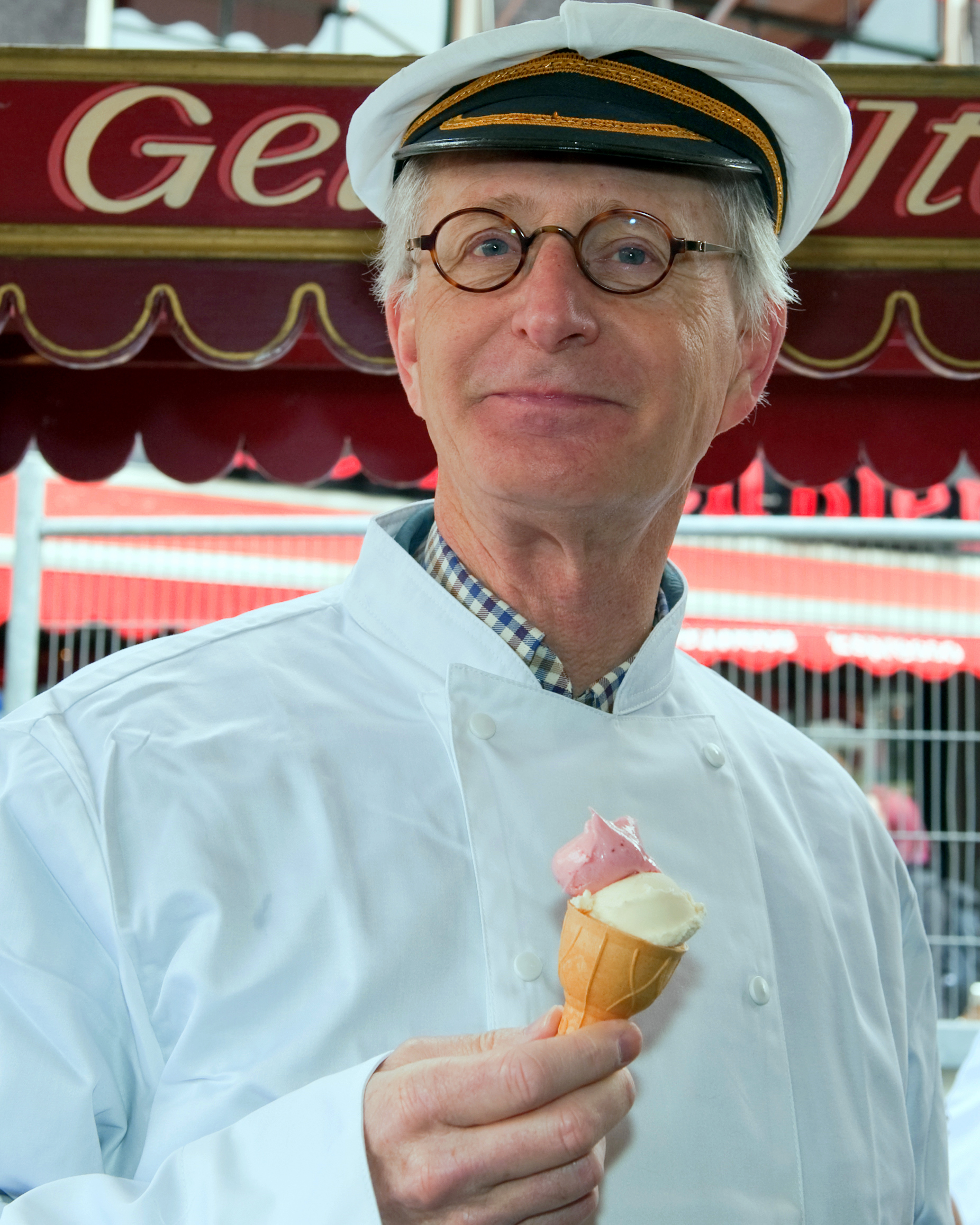 AMSTERDAM - Op zaterdag 27 en zondag 28 maart organiseert de Noord/Zuidlijn samen met de winkeliers uit de buurt een IJsfeest op het Rokin. Op zaterdag om 12 uur schepte wethouder Hans Gerson van Verkeer en de heer Koster, voorzitter van de ondernemersvereniging Rokin, ijs voor alle aanwezigen. Met dit evenement wil de Noord/Zuidlijn zowel de winkels in de buurt van het Rokin, als de werking van de vriesinstallatie onder de aandacht brengen. Vanaf maandag 29 maart worden de wanden van station Rokin bevroren, zodat het verder uitgraven van de bouwput veilig kan plaatsvinden. Er zin voor de kinderen veel activiteiten en acts die alles te maken hebben met vriezen. Deze vinden plaats in een grote tent op het bouwterrein, in het Uitkijkpunt Rokin aan tramhalte Spui en langs de winkels aan het Rokin.